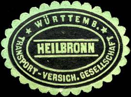 Siegelmarke der Württenbergischen Transport Versicherungs AG